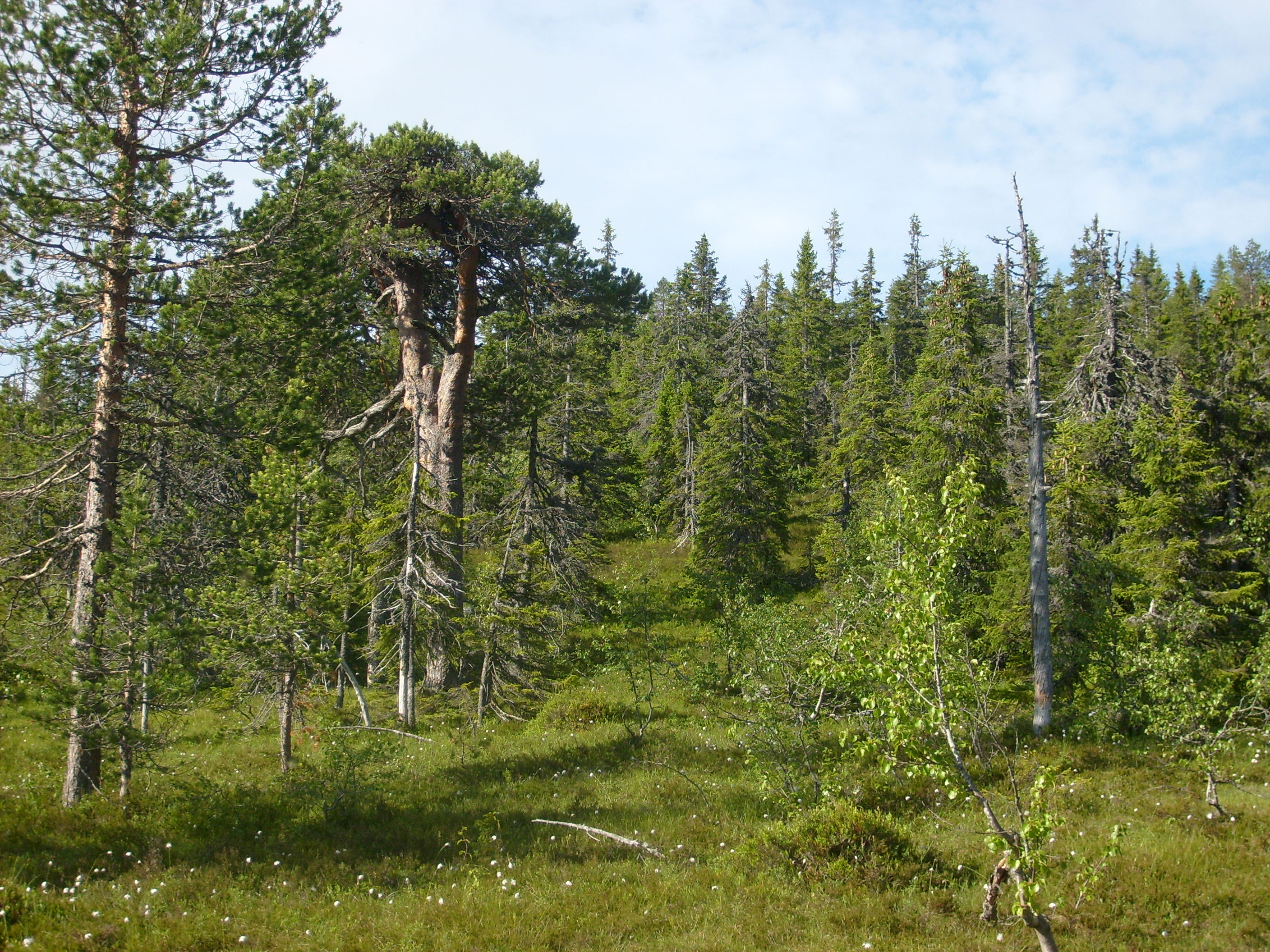 Urskogsrest nordvästsluttningen Storvarden, Tandövala naturreservat.